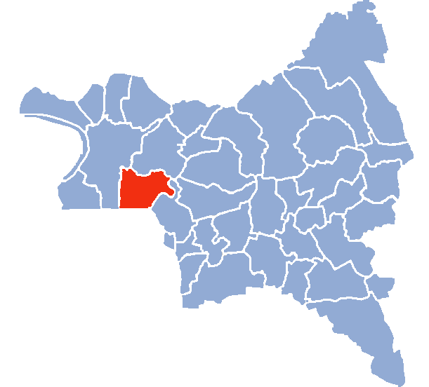 Auteur Hervé SUAUDEAU Licensing Catégorie:Cartes de Seine-saint-Denis Catégorie:Aubervilliers